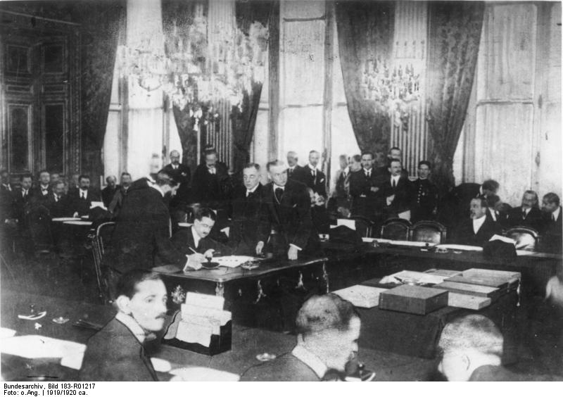 Zentralbild Die Beendigung des I. Weltkrieges 1914-1918 Der Vertreter der deutschen Reichsregierung, Kurt Freiherr v. Lersner, ab Juli 1919 Nachfolger Brockdorff-Rantzaus als Vorsitzender der deutschen Friedensdelegation, bei der Unterzeichnung von Verträgen zum Friedensvertrag im Uhrensaal des Aussenministeriums in Paris.